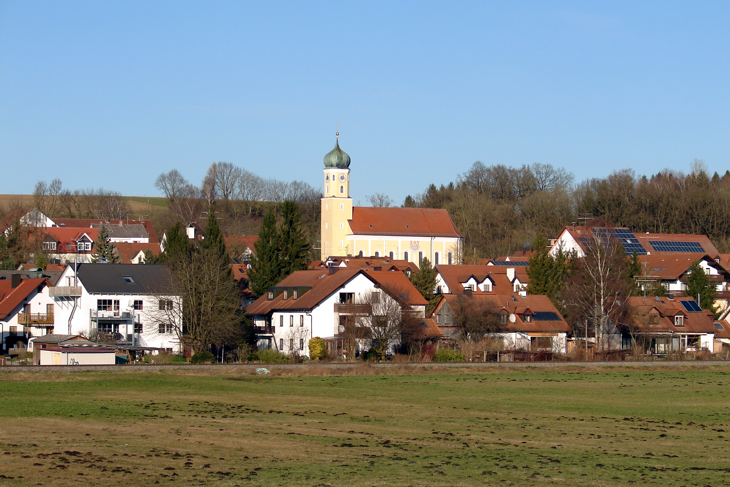 Haag an der Amper ist eine Gemeinde im oberbayerischen Landkreis Freising und Mitglied der Verwaltungsgemeinschaft Zolling.